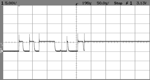 Typisches Oszillogramm eines prellenden Tasters über etwa 250µs andere Versionen